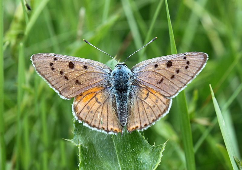 Čiobrelinis auksinukas (Lycaena alciphron)